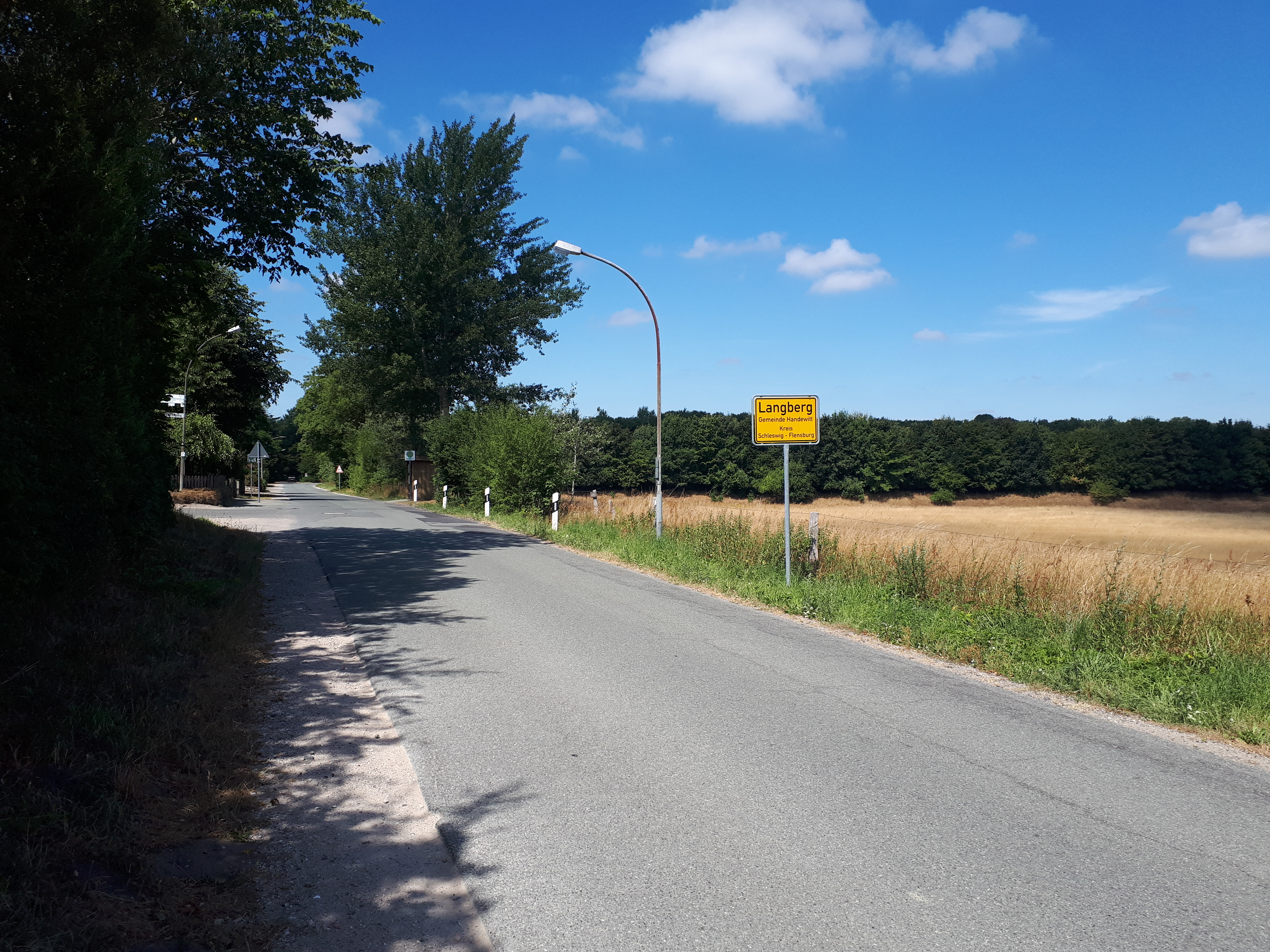 Blick vom Ortsteil Oberlangberg auf die Rollbahn von Flugplatz Schäferhaus